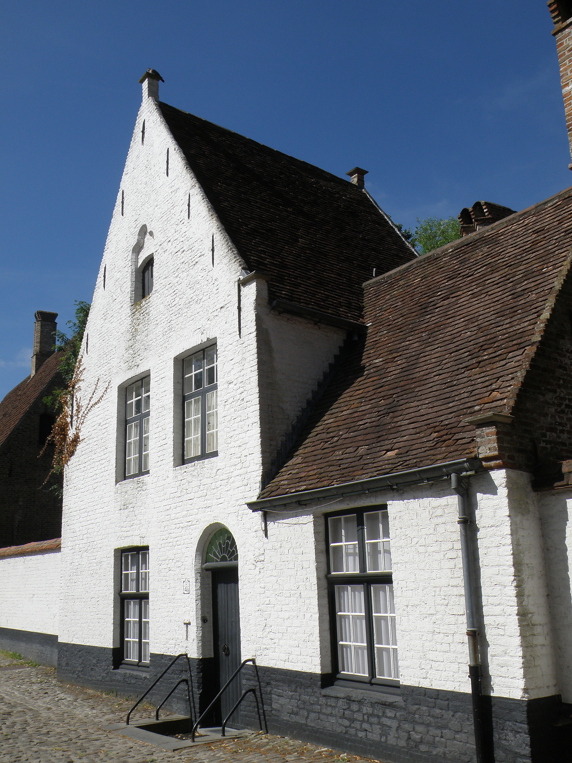 Brugge, Begijnhof. Begijnenhuis nr. 46.